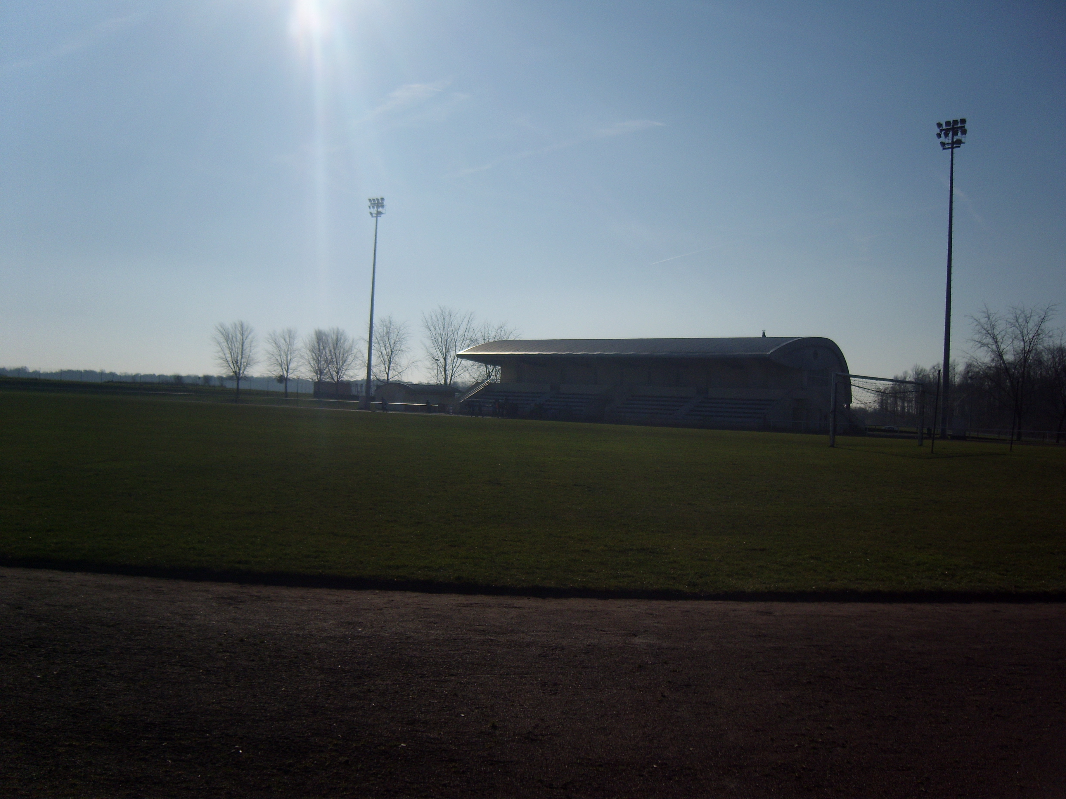 Le complexe sportif Pierre Cure de Fontenay-Trésigny